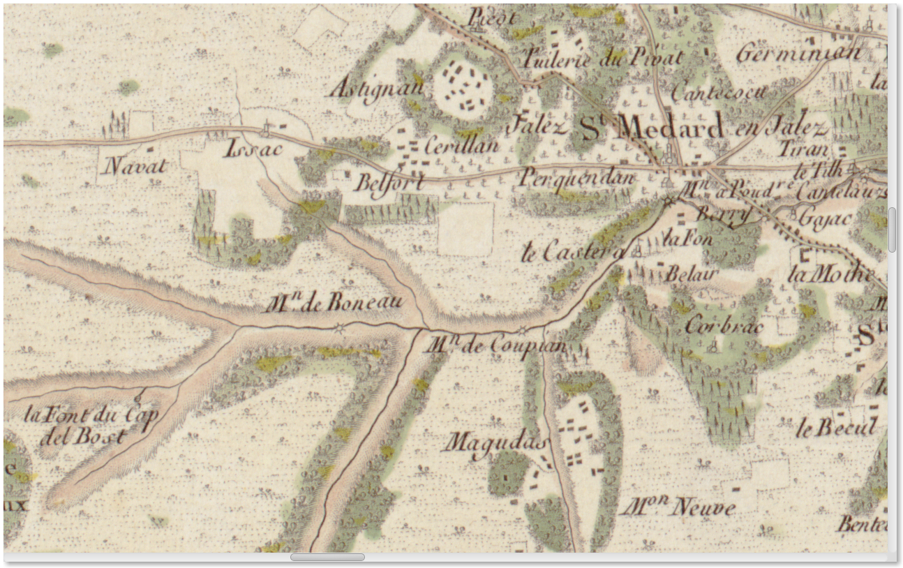 Carte de Cassini n°104 (Bordeaux, zoom sur Saint-Médard-en-Jalles), 1756.